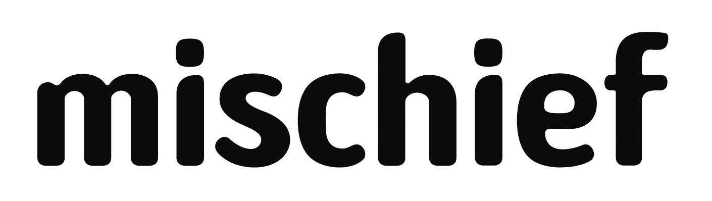 Logo der Produktionsfirma "Mischief Films"